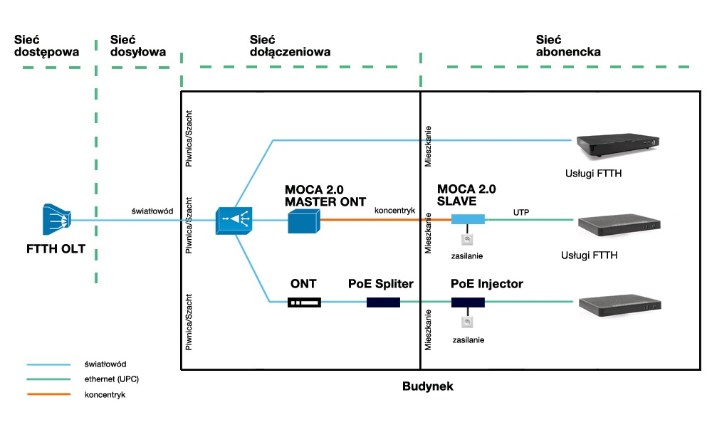 Grafika przedstawia architekturę FTTH w podziale na technologie dostępne w sieci GPON - FTTH, MoCA, PoE.